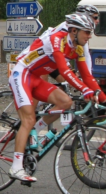 John-Lee Augustin, Barloworld bei der Ster Elektrotoer 2008 zu Baelen. Kategorie:Vëlossportler